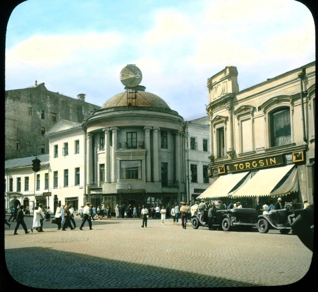 Москва. ТОРГСИН